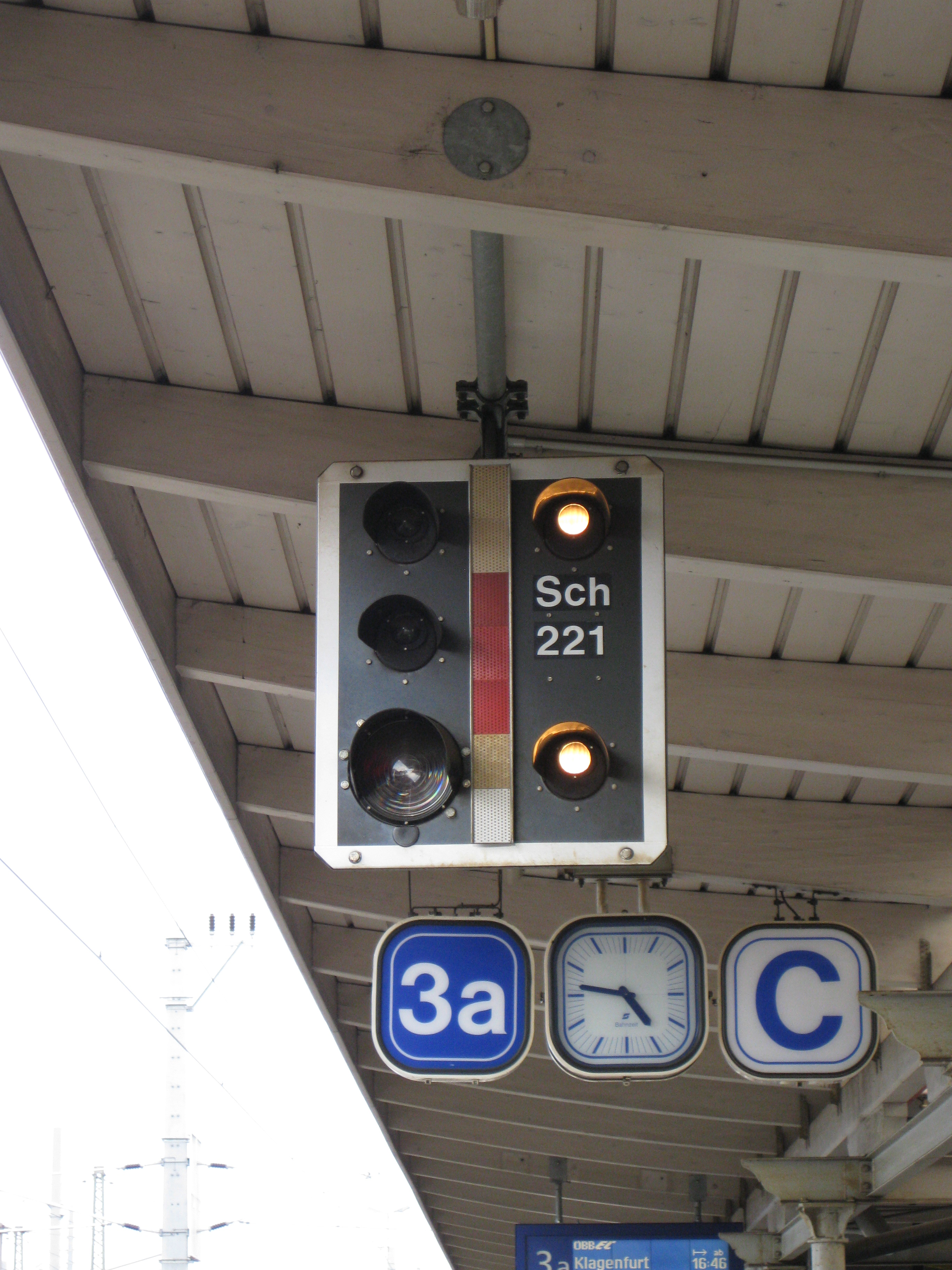 Schutzsignal ÖBB mit Begriff Frei.